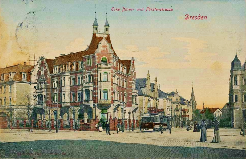 La encrucijada en el largo avenida de los príncipes y dürer.